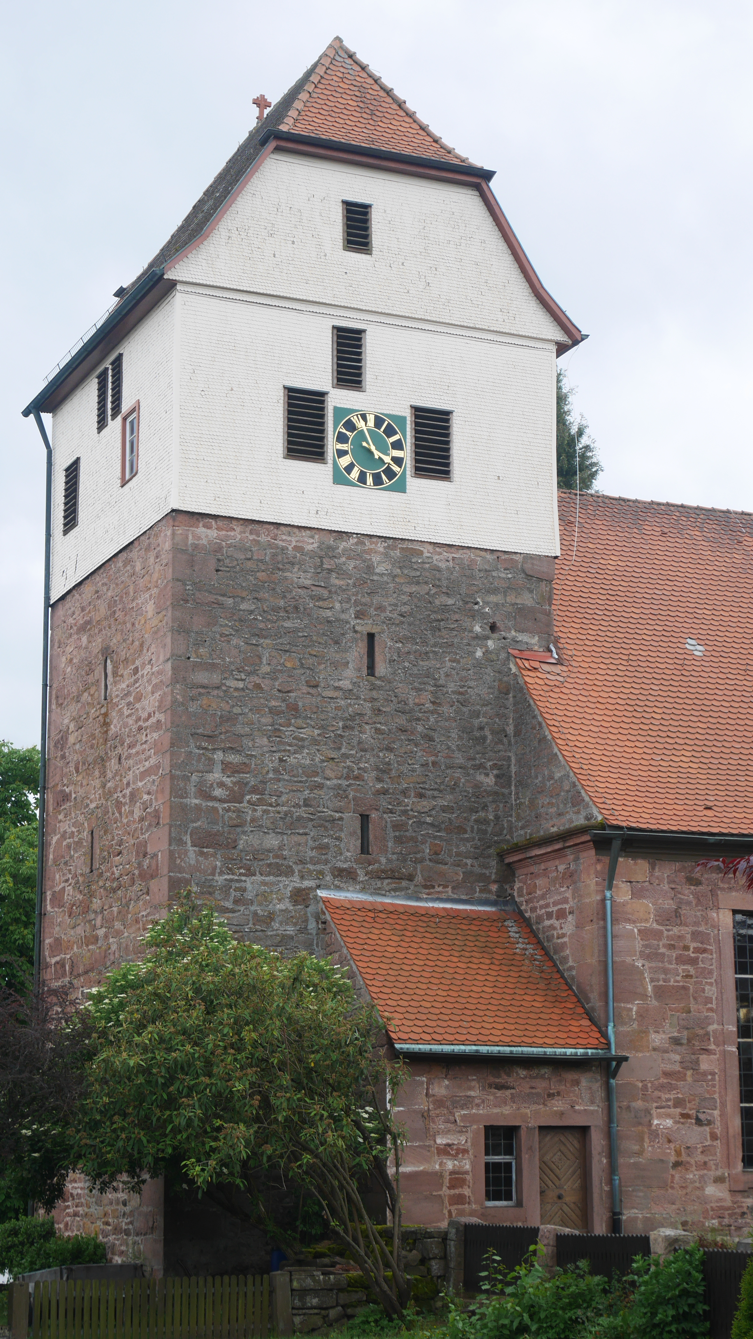 Ulrichskirche Langenbrand Ansicht